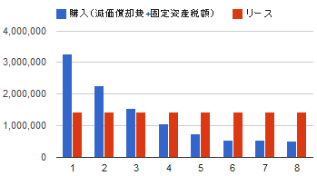 以下の条件で作成した、リース及び購入の費用比較グラフ 飲食店業用設備 耐用年数 8年 減価償却方法 定率法 償却率 0.313 改訂償却率 0.334 保証料率 0.05111 償却保証額 511,100 物件金額 10,000,000 リース期間(月) 96 リース料率 1.19 月額リース料 119,000 リース料総額 11,424,000 固定資産税率 0.014